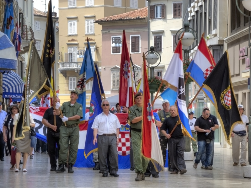 Povorka ponosa i slave za Dan državnosti u Rijeci.